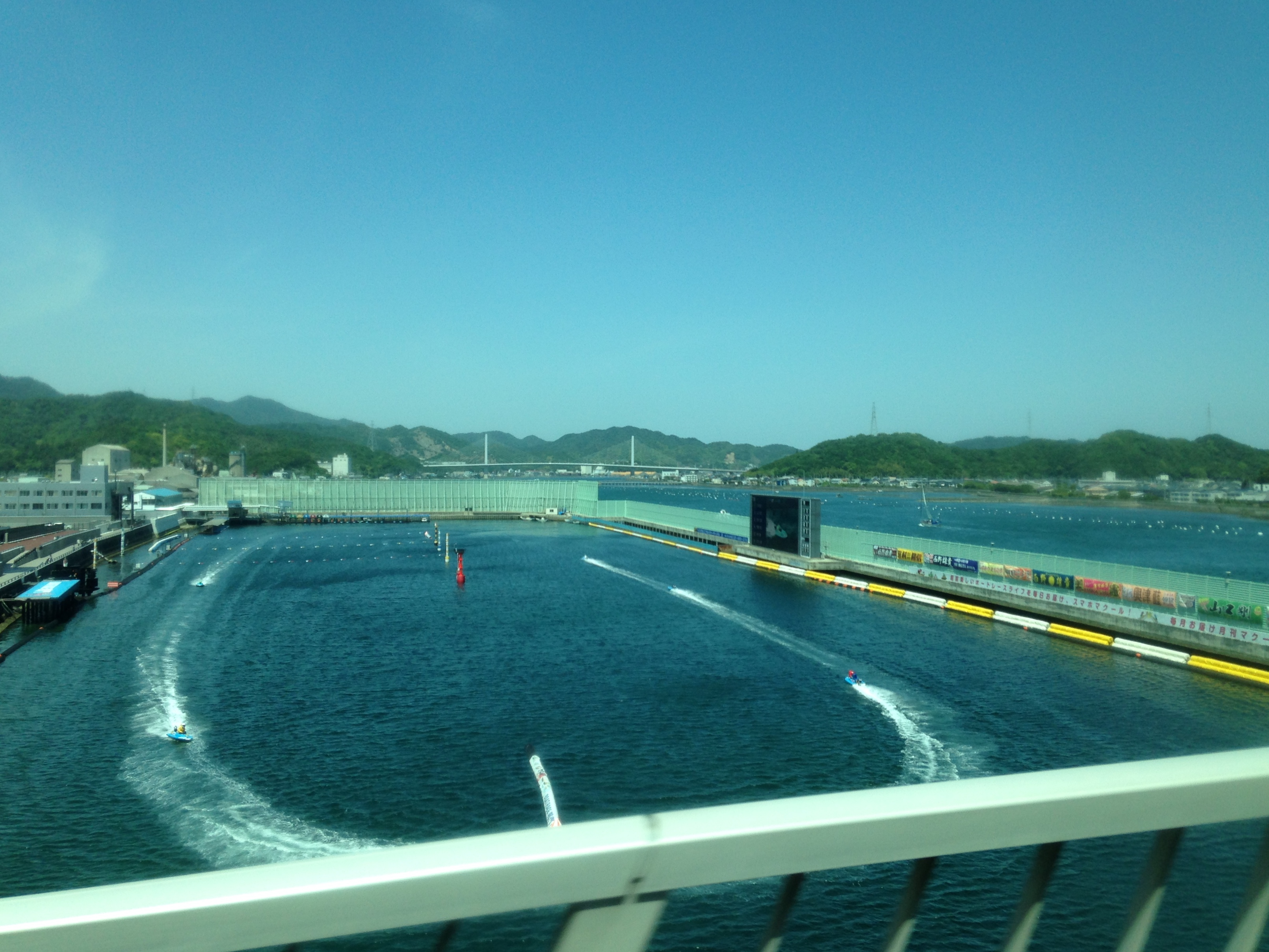 小鳴門橋のバス車内より望む鳴門競艇場の水面